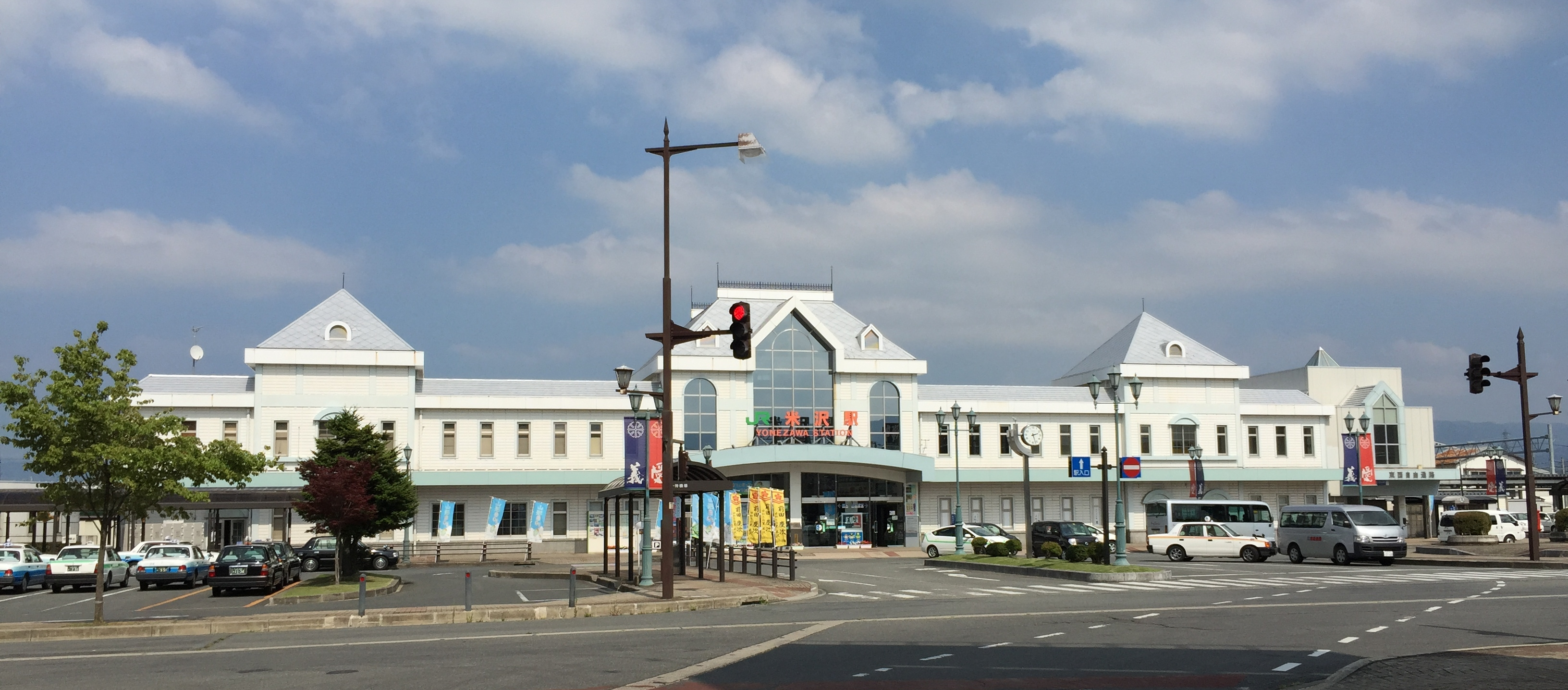 米沢駅西口